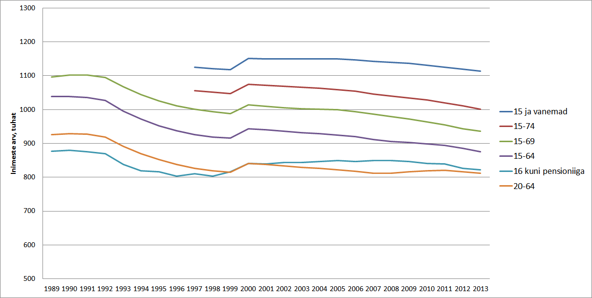 Tööealine rahvastik Eestis 1989-2013 erinevate vanusepiiride korral. Statistikaameti andmed